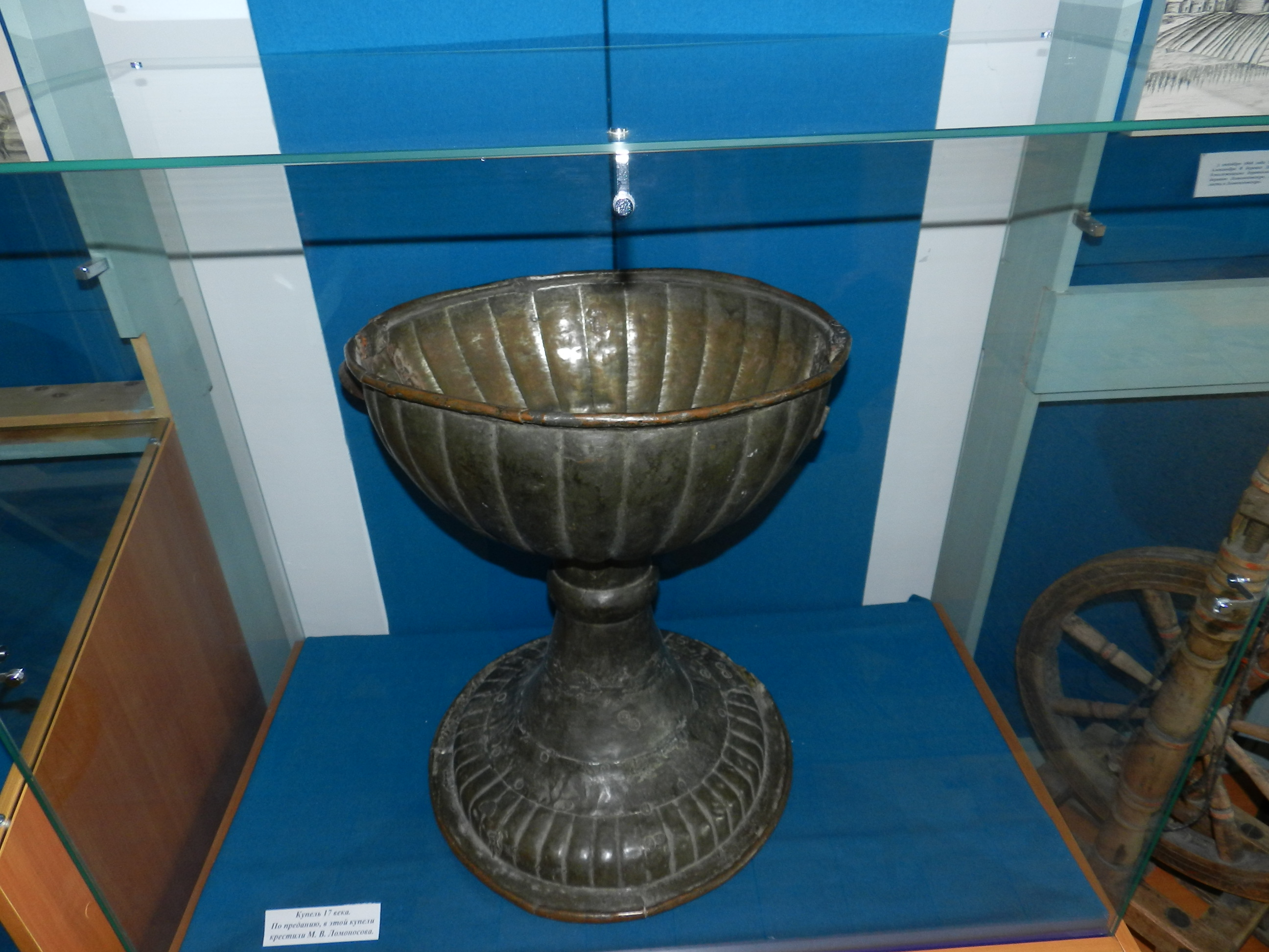 Купель, в которой крестили Ломоносова. Музей Ломоносова в Холмогорах.